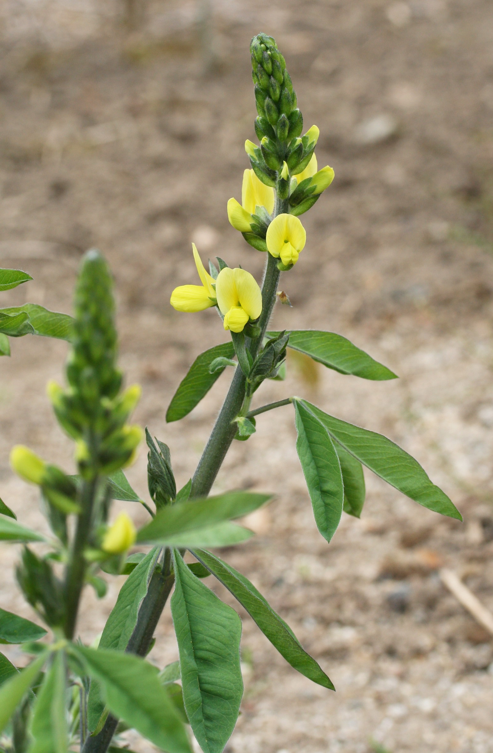 Thermopsis fabacea im Botanischen Garten Dresden